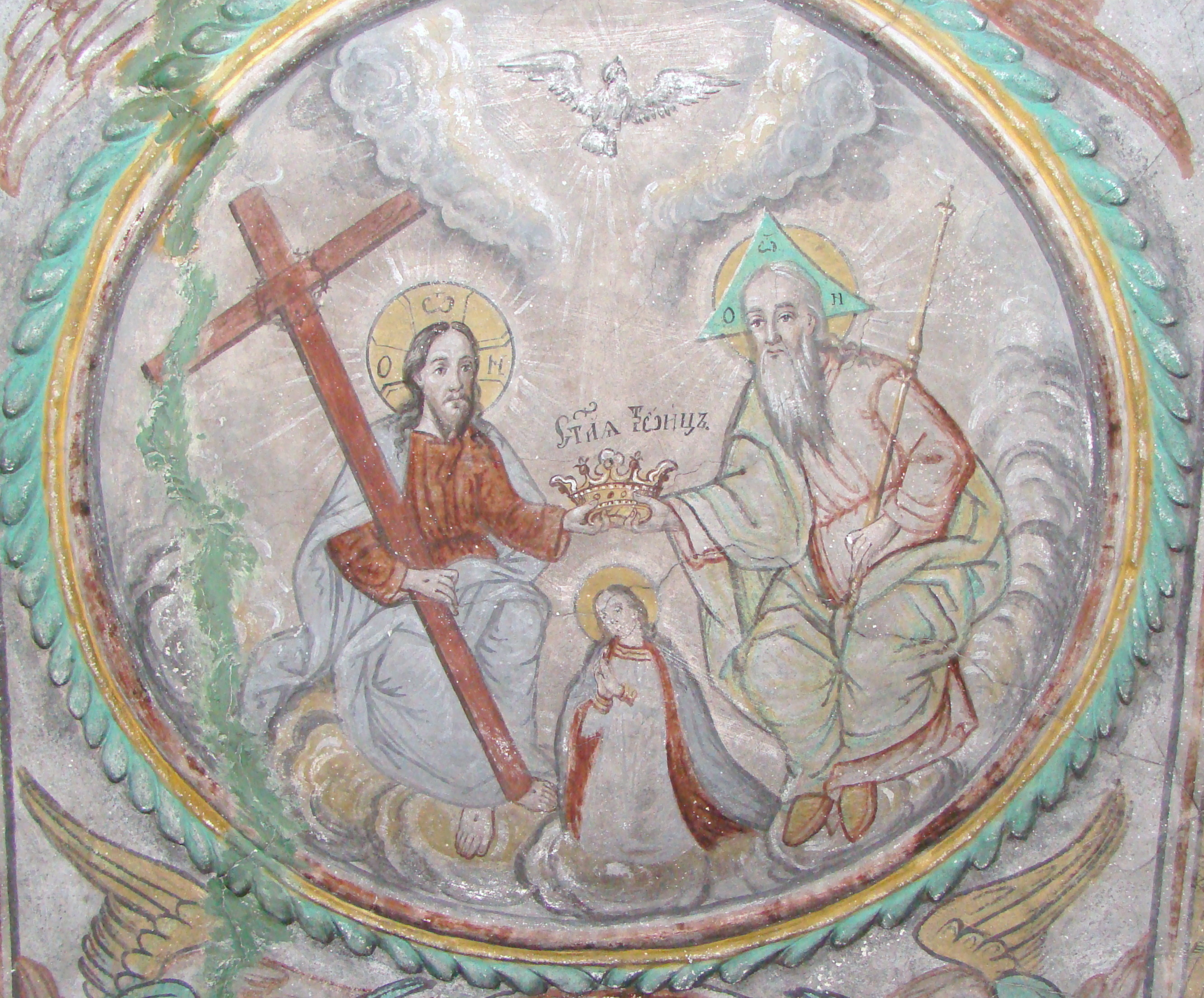 Biserica „Sf. Dumitru”, sat Poieni; comuna Vidra